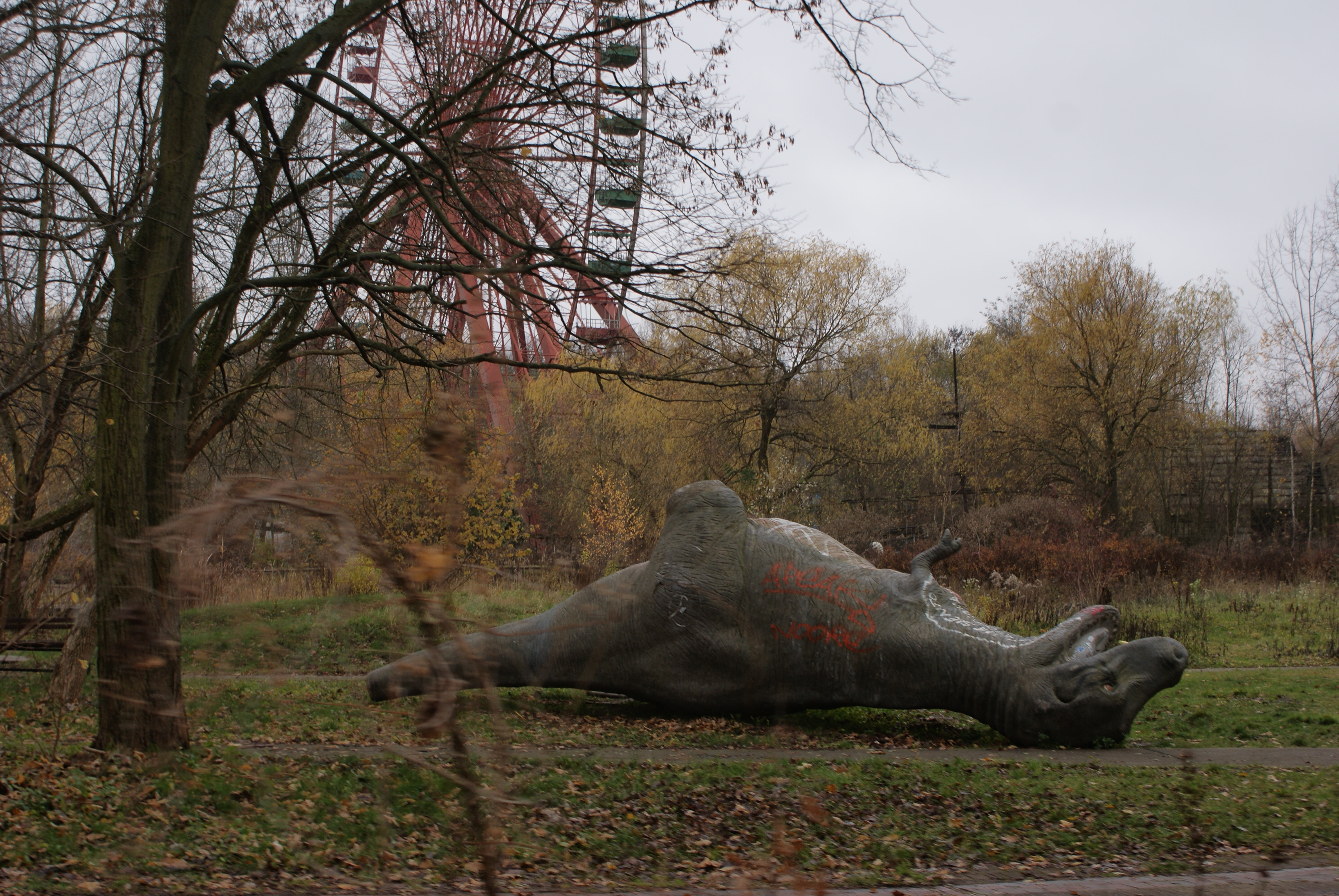 Kaputte Dinosaurier im ehemaligen Spreepark im Plänterwald Berlin